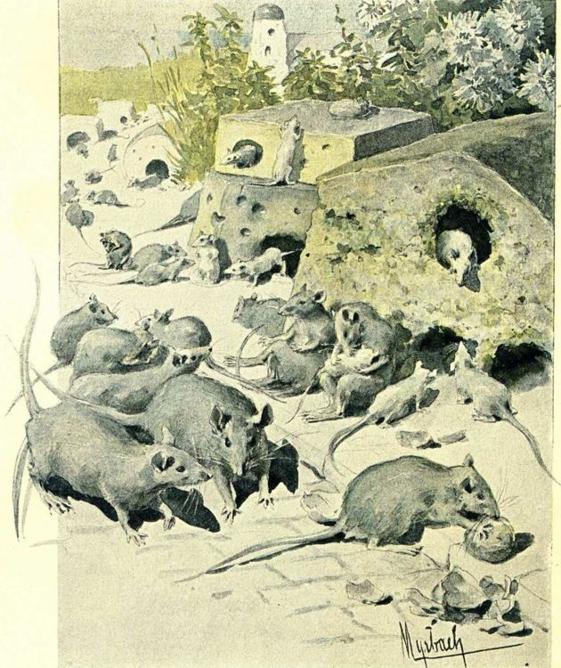 An illustration from Jules Verne's short story "Aventures de la famille Raton" (1866-69) Orginal description taken from the book: Une fort jolie ville, que la ville de Ratopolis...